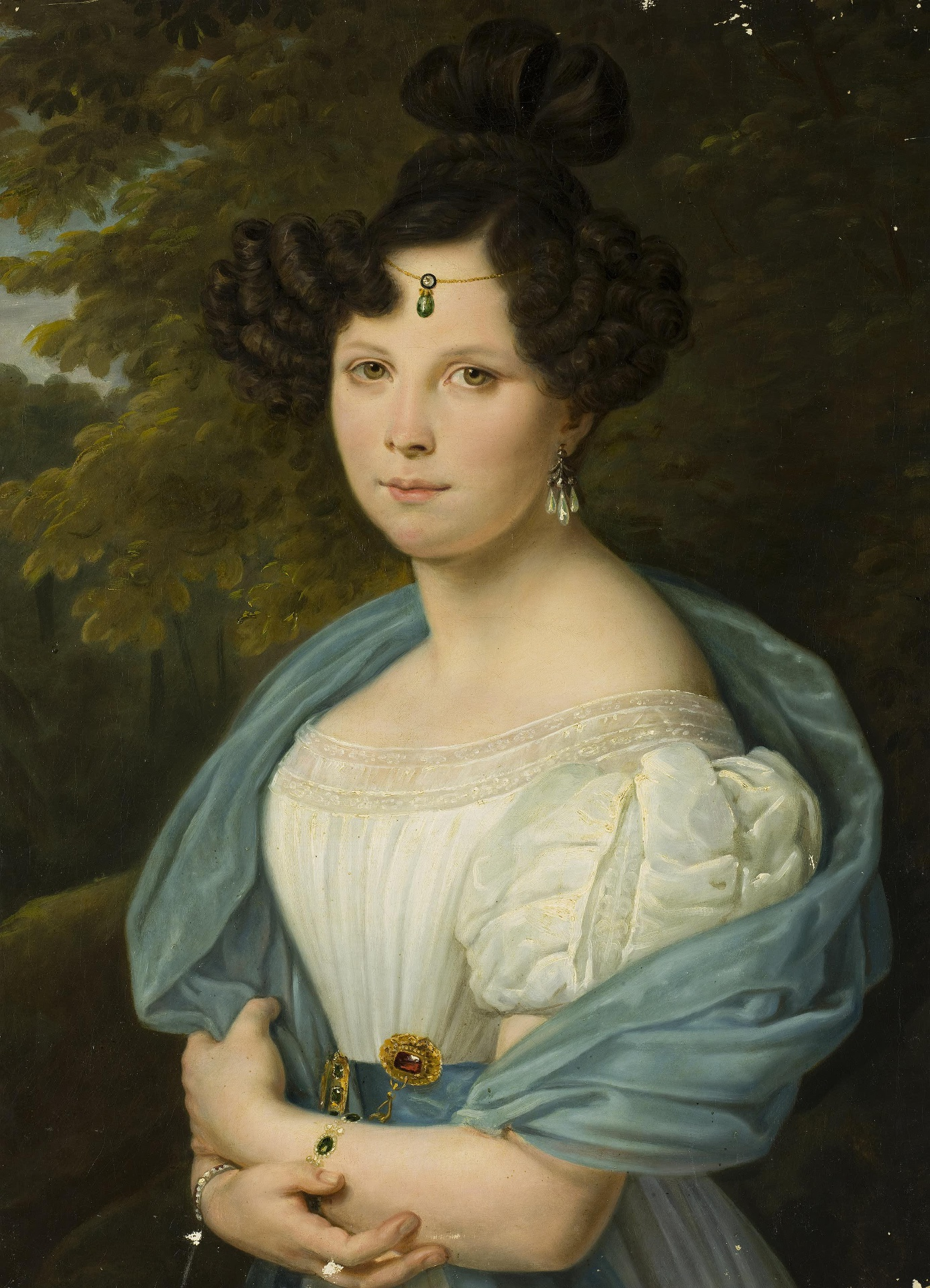 Княгиня Софья Алексеевна Голицына (1808—1858), ур. Корсакова.